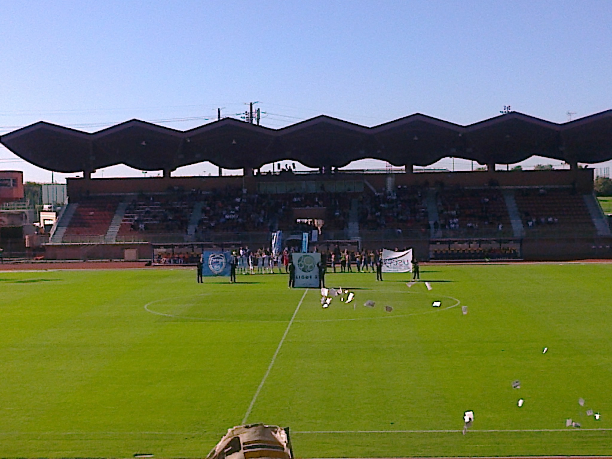 Présentation des équipes lors du match US Créteil - Troyes du 18 octobre 2014 au stade Dominique-Duvauchelle (1-1).